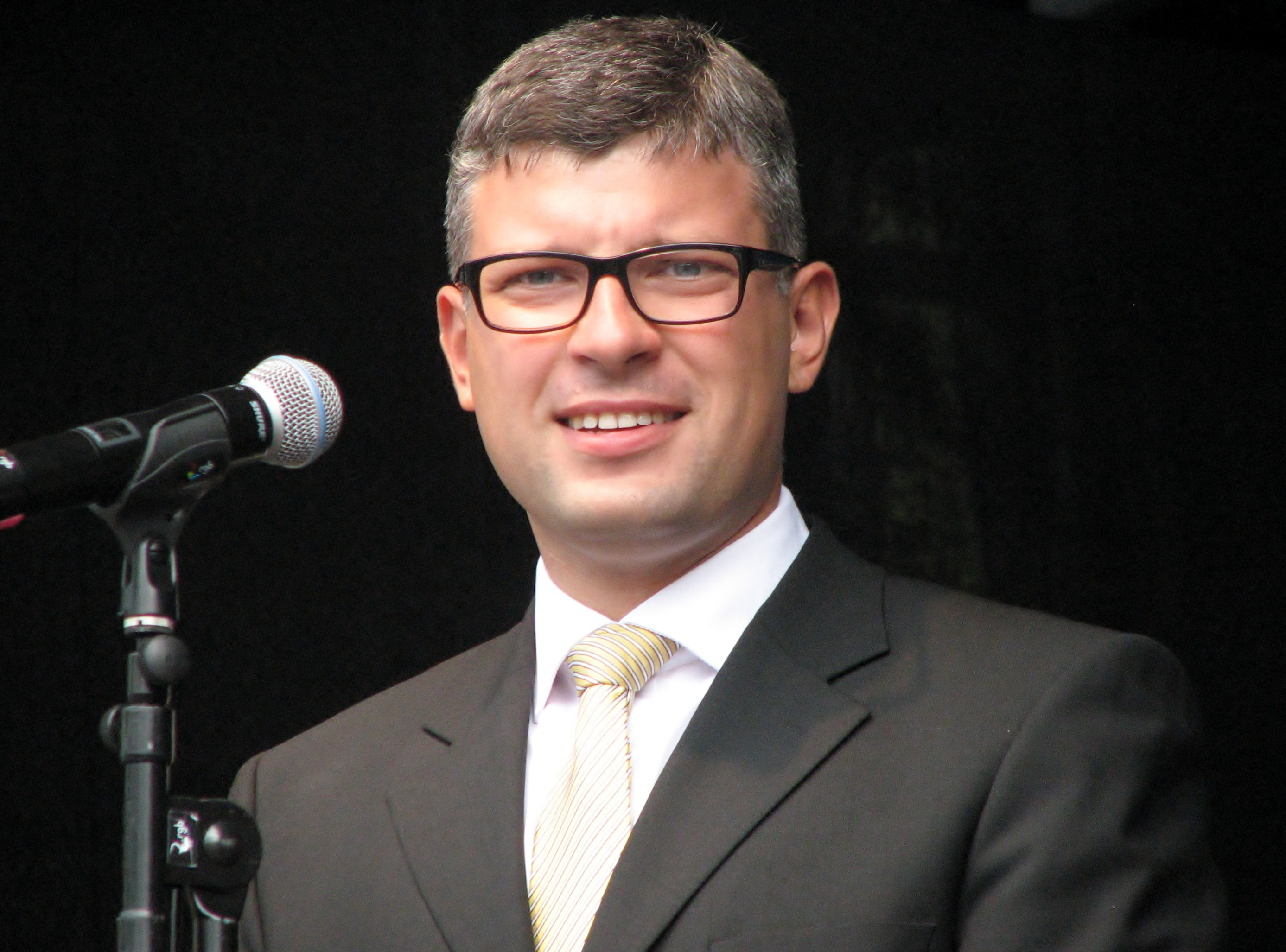 Mihhail Korb esinemas Tallinnas Vabaduse väljakul aabitsapeol